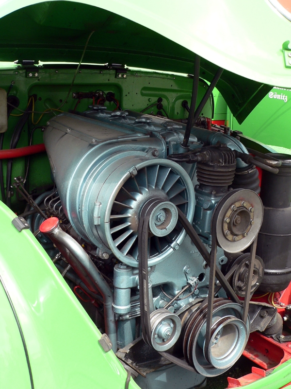 F 4L 514 — первый автомобильный дизельный двигатель с воздушным охлаждением, разработанный фирмой Дойц.